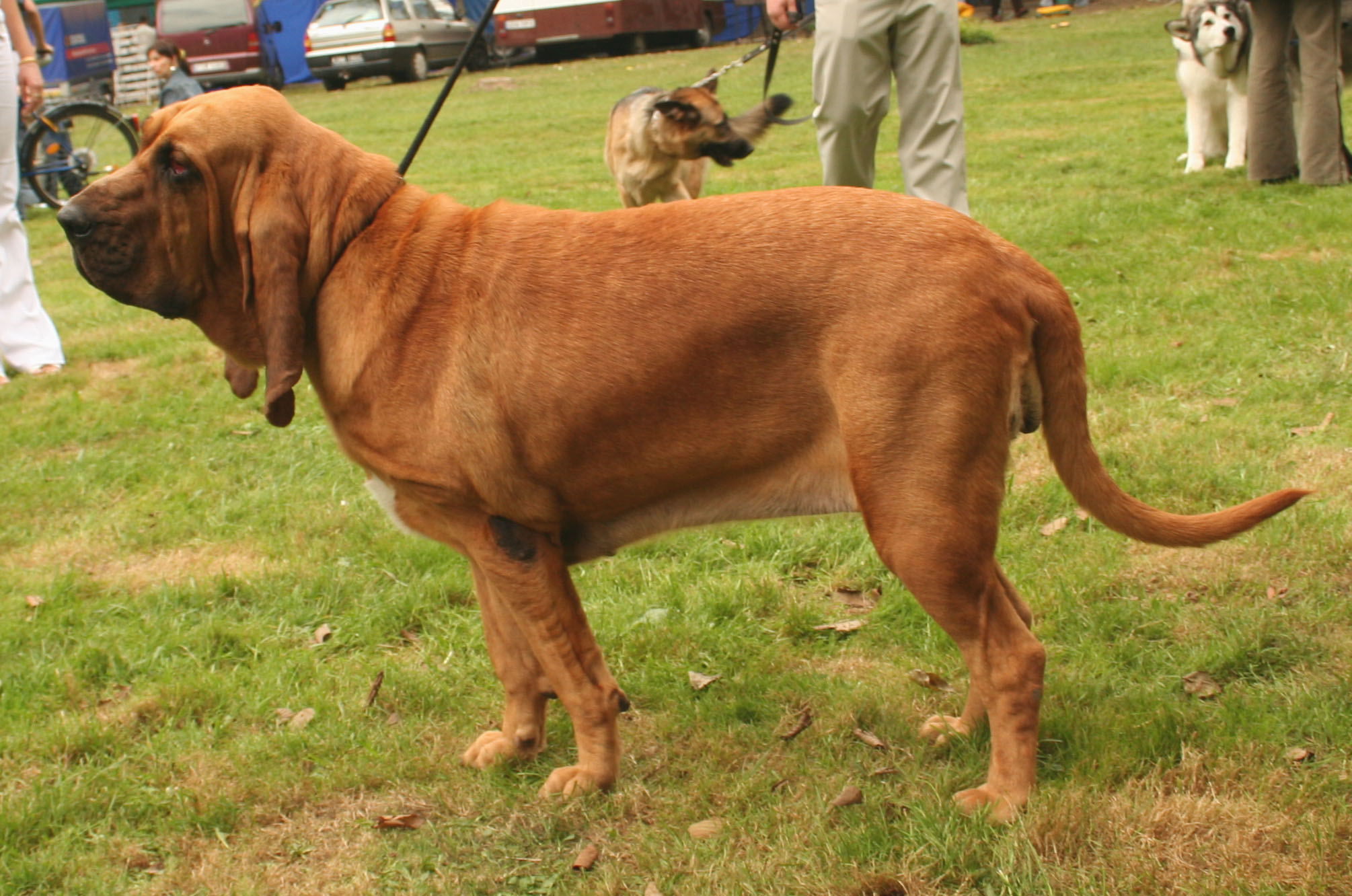 Bloodhund na krajowej wystawie w Rybniku - Kamieniu